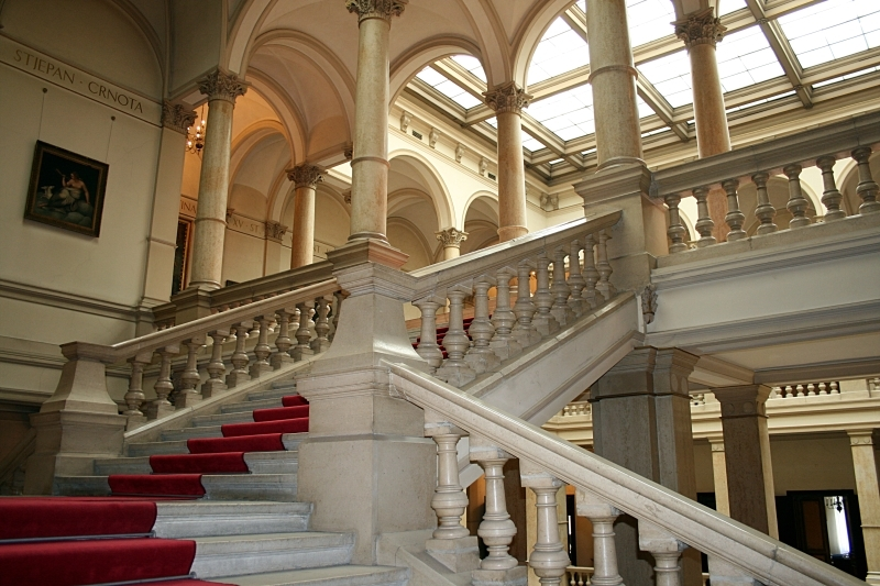 Svečano proglašenje i predstavljanje novih članova Hrvatske akademije znanosti i umjetnosti u Zagrebu